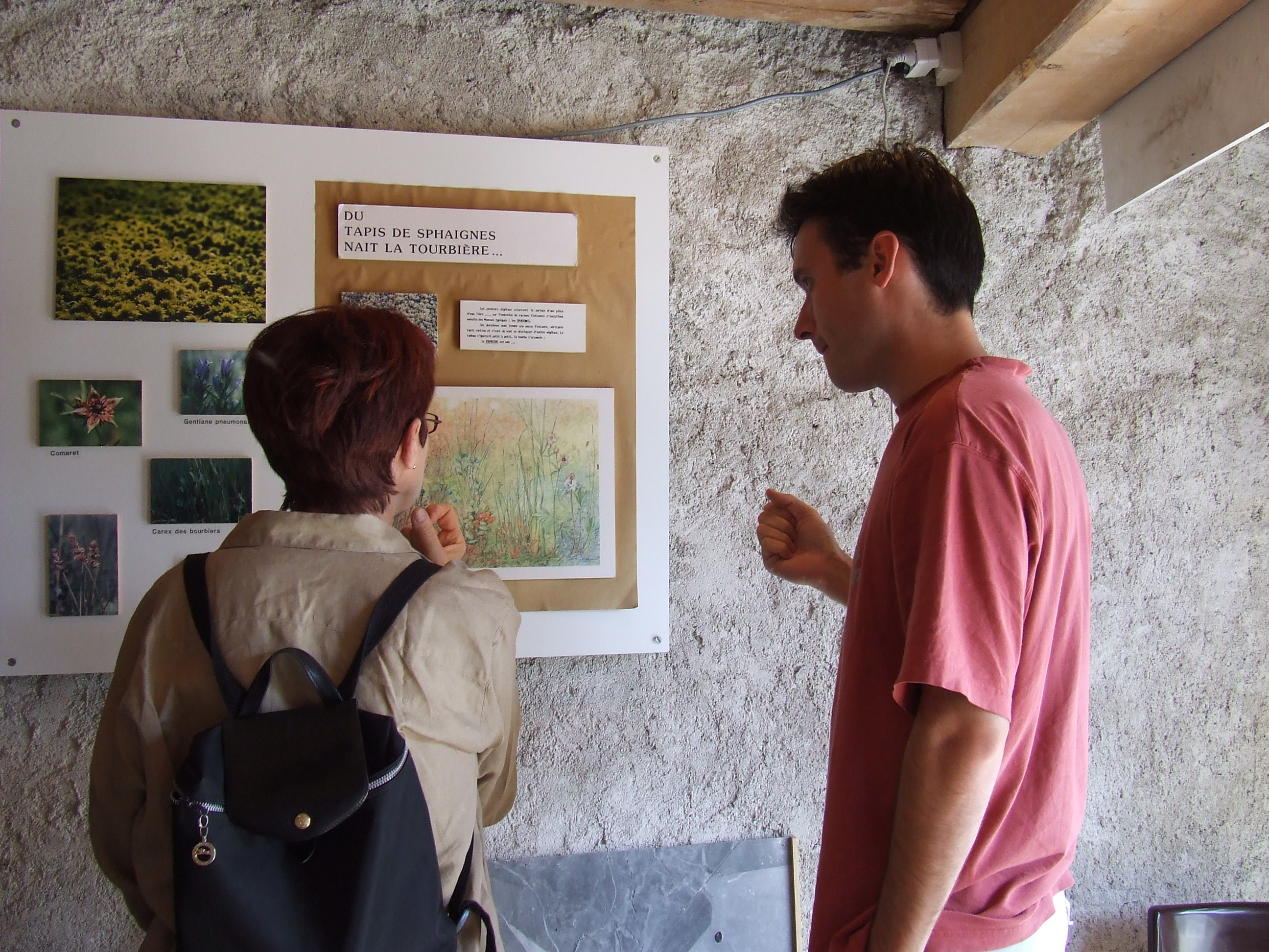 Accueil des visiteurs à l'exposition de la réserve naturelle des Sagnes de la Godivelle, département du Puy-de-Dôme, Auvergne, France.